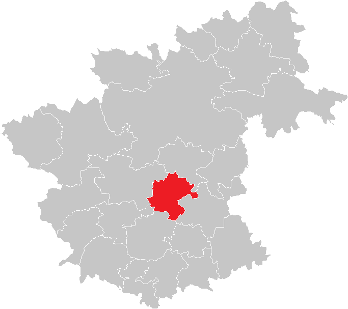 Bezirk Zwettl